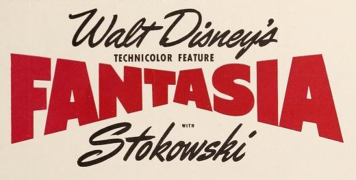 A 1942 advertisement for Fantasia